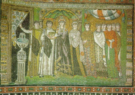 "תיאודורה ואנשי חצרה" פסיפס בסגנון הביזנטי, 547 לס', 440/432, סאן ויטלה, ראוונה.